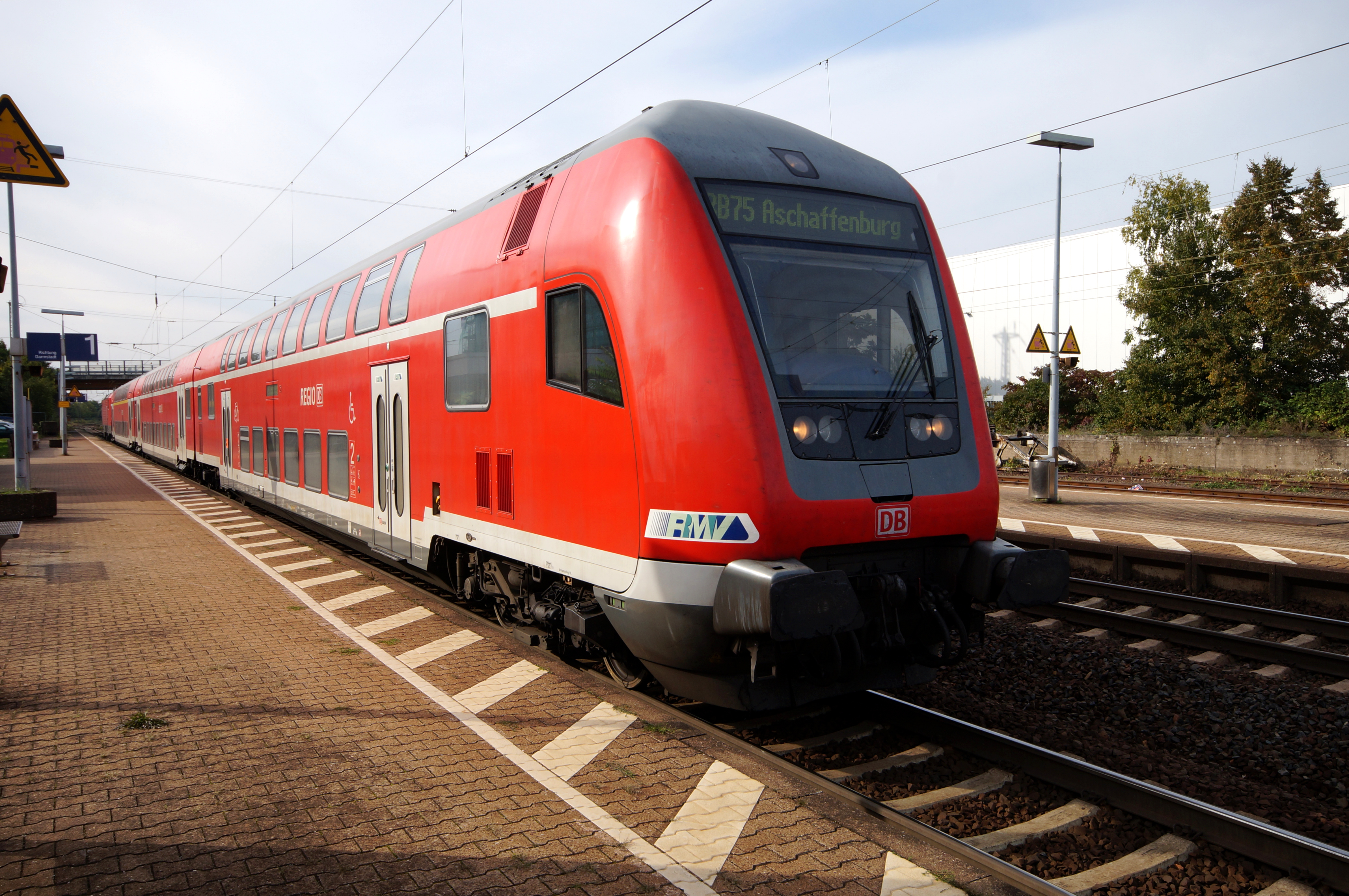 Ein Doppelstockwagen der Deutschen Bahn im Bahnhof Groß Gerau auf dem Weg nach Aschaffenburg